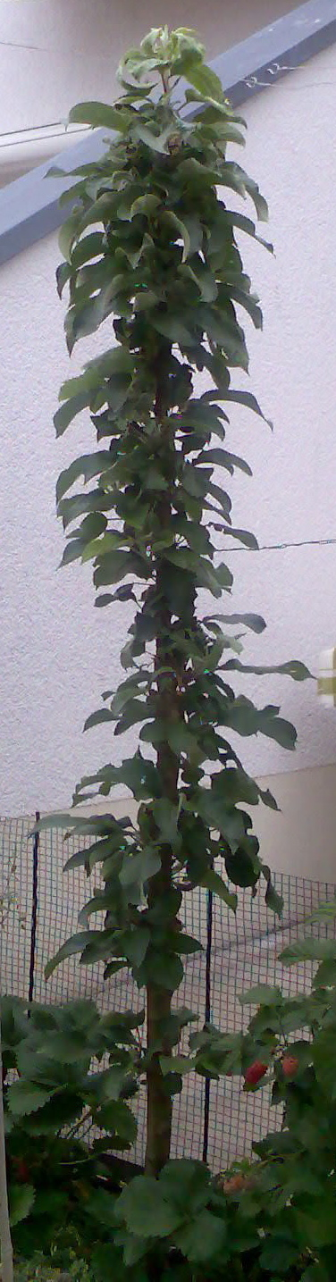 Obstbäumchen, Ballerina(R)